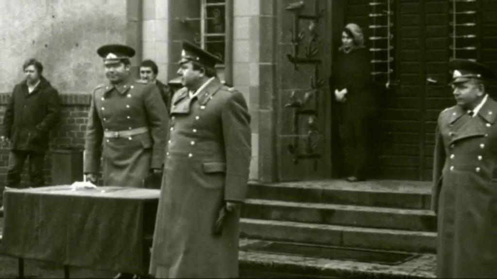 Перед клубом